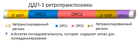 ДДП-1-ретротранспозоны